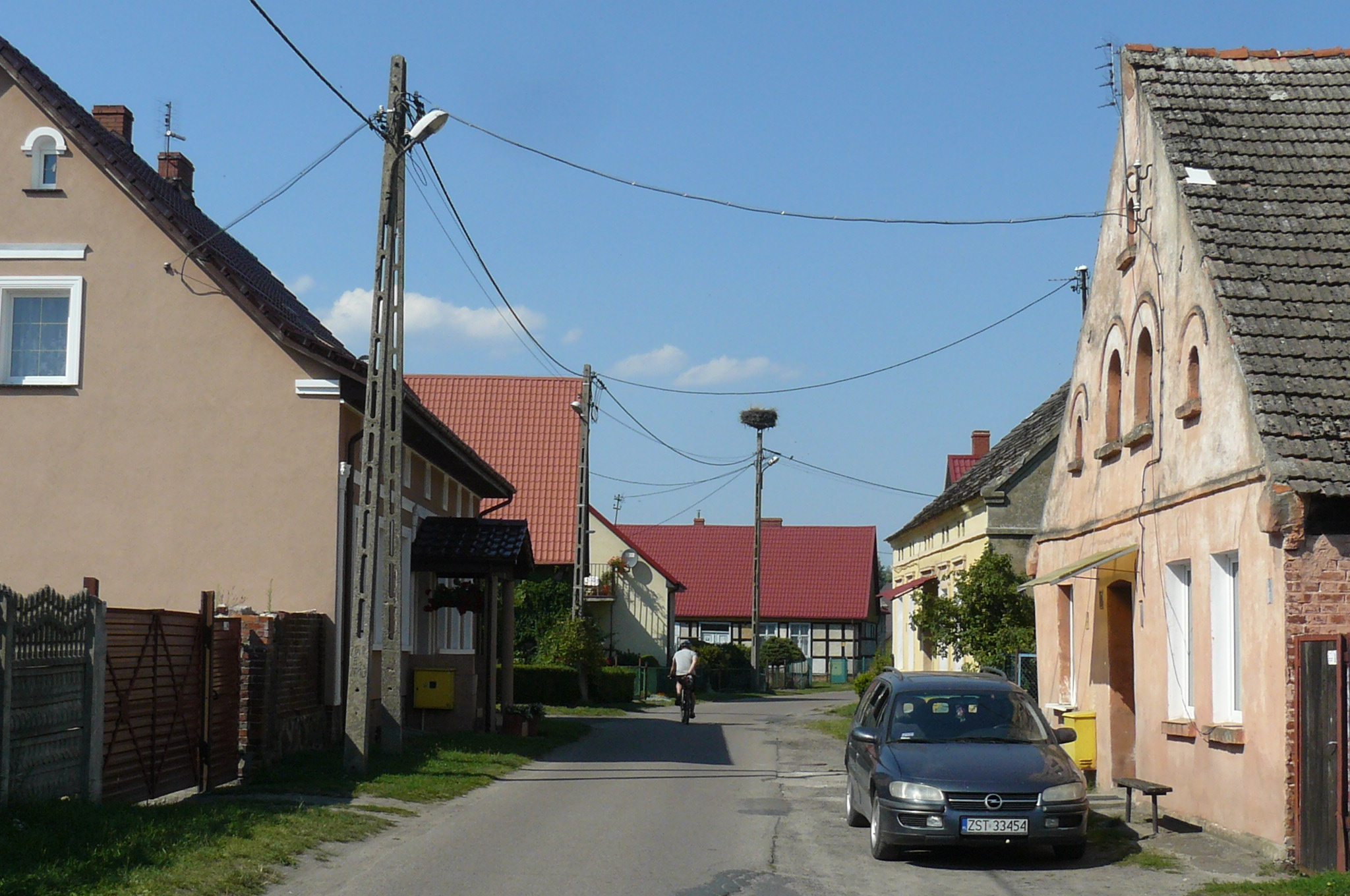 Żelewo nad Miedwiem.